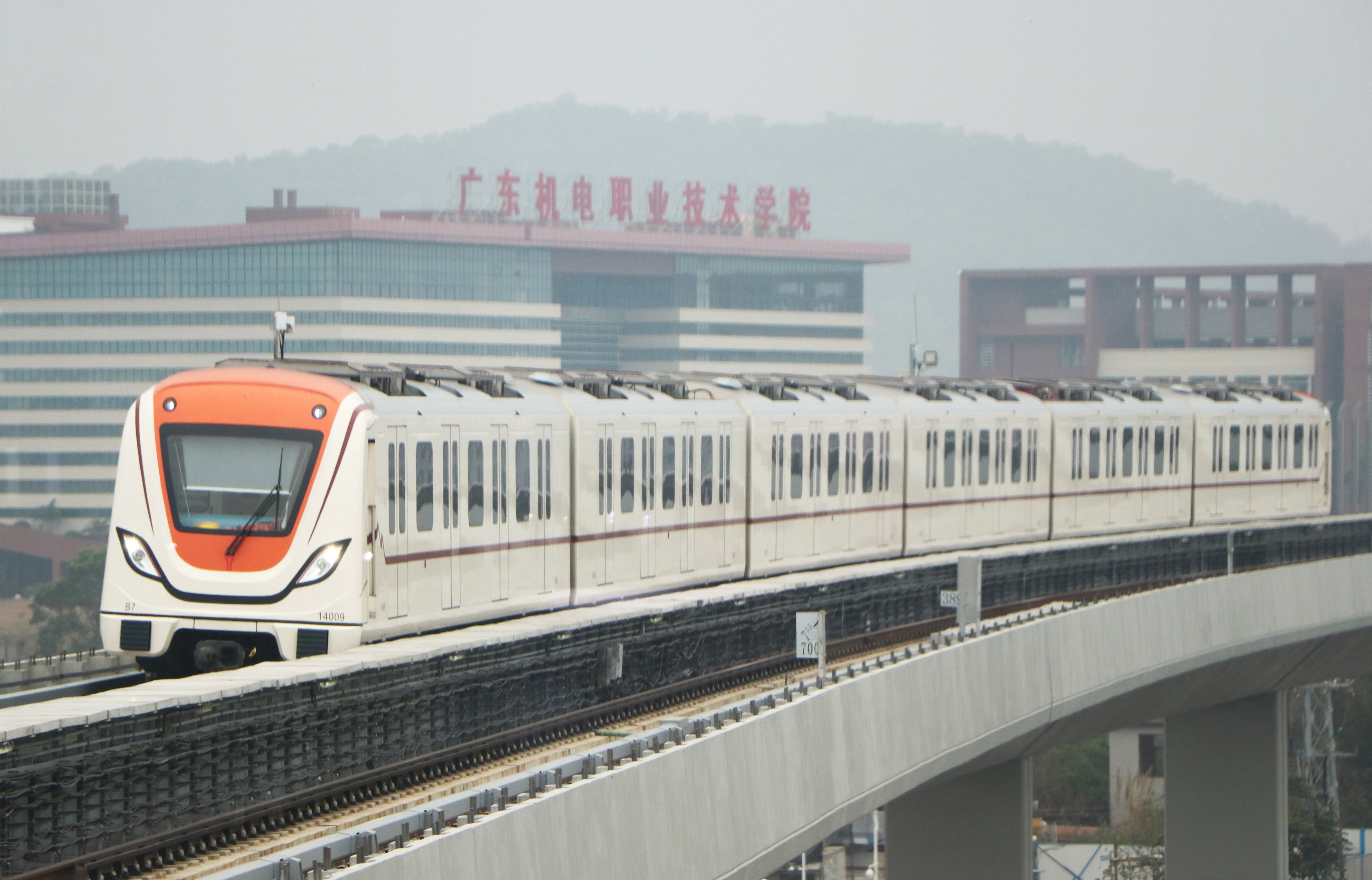 广州地铁B7型